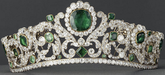 tiara de la duwuesa de angouleme